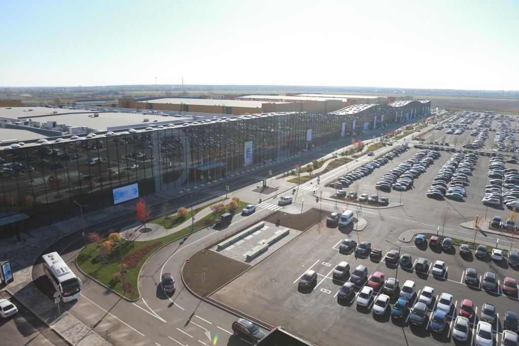 Вид на павильону и парковку Экспофорума